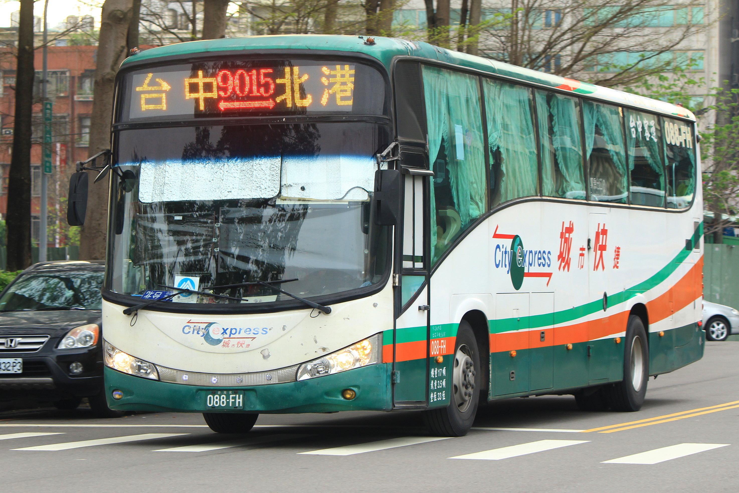 中文（台灣）: 干城找位子休息去~